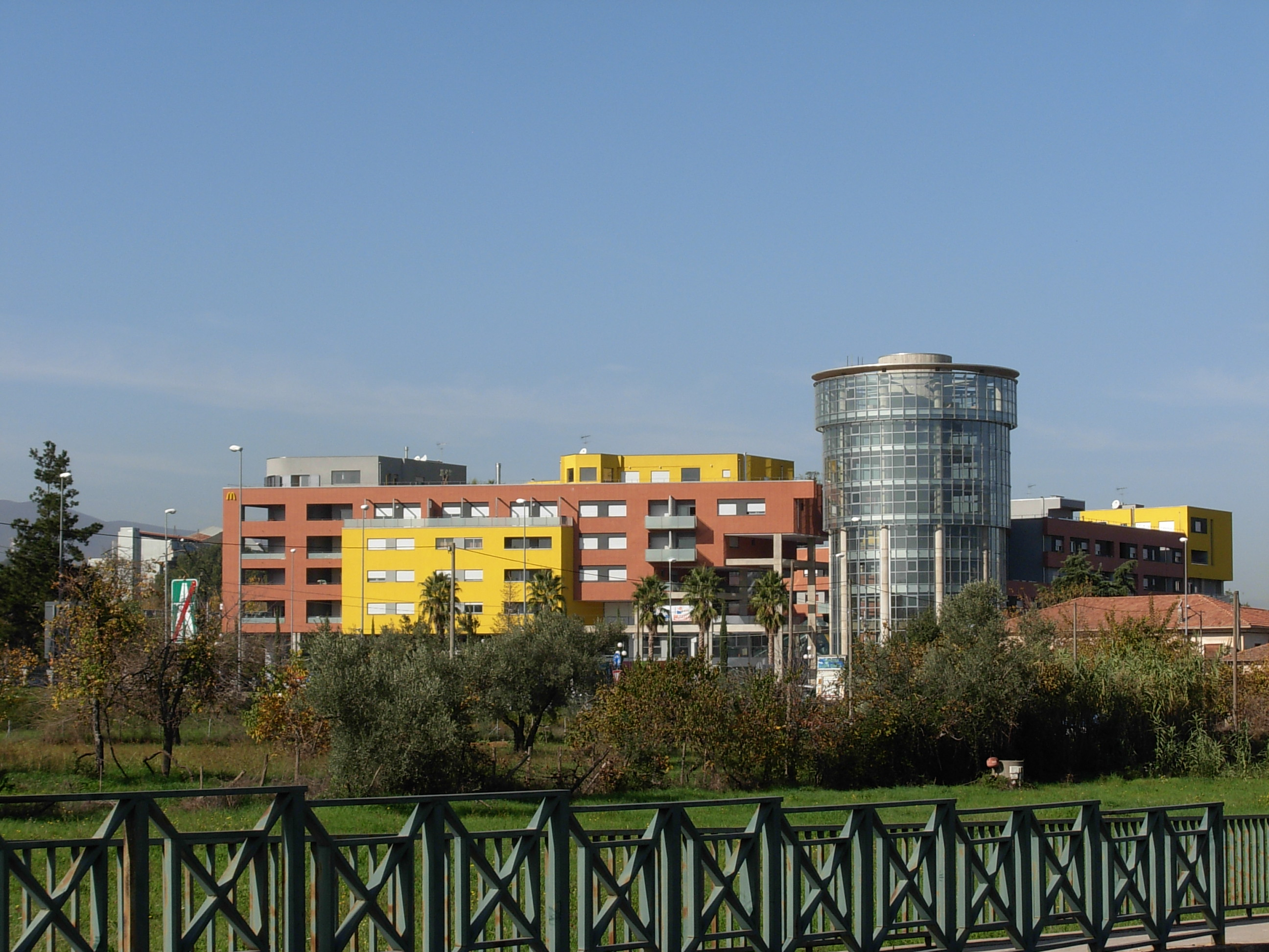 Centro Commerciale Cosenza Nord